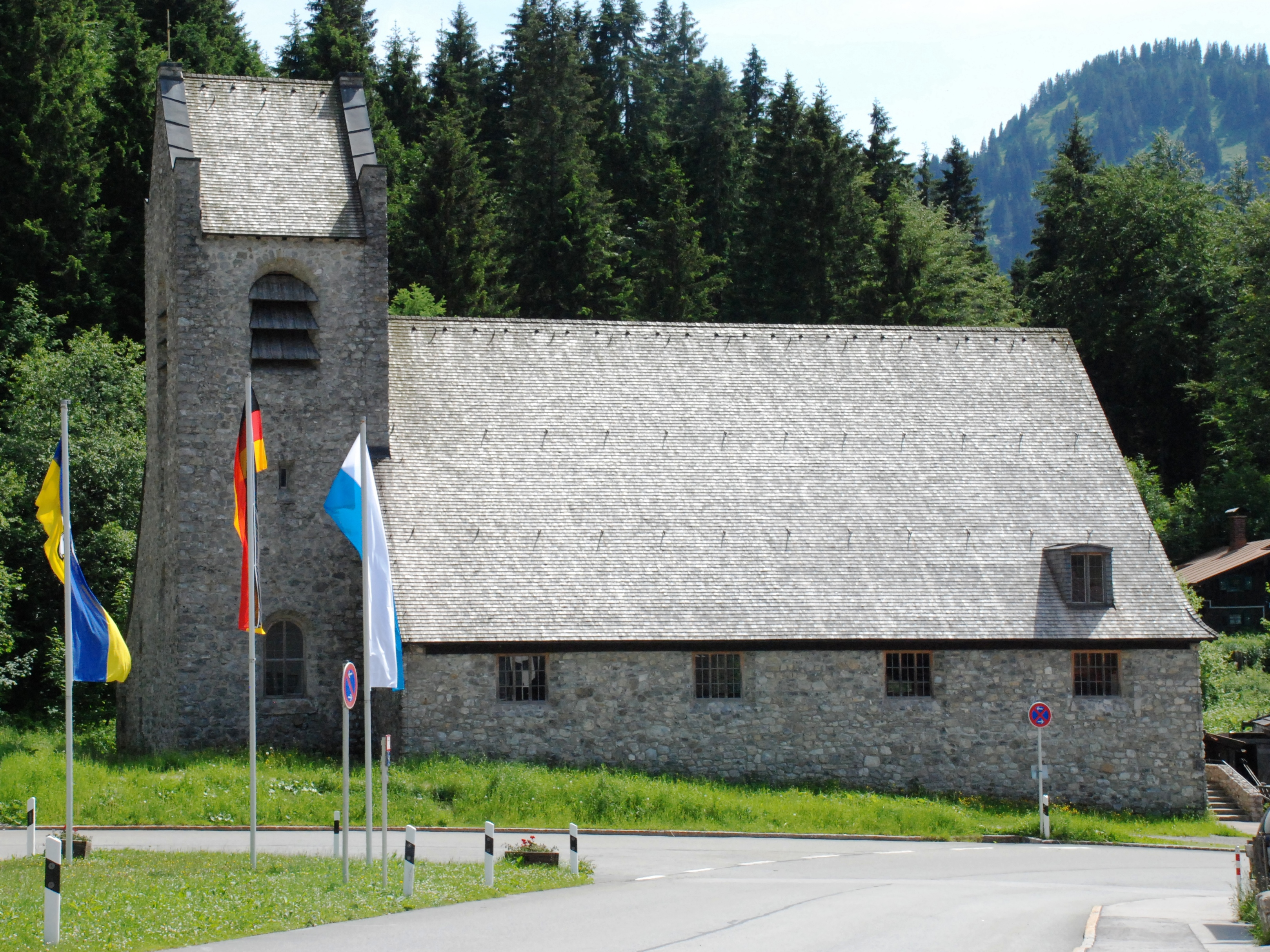 Katholische Kirche St. Bernhard in Spitzingsee, Ortsteil von Schliersee, Landkreis Miesbach, Bezirk Oberbayern, Bayern. Als Baudenkmal in der Bayerischen Denkmalliste aufgeführt. Laut Denkmalliste erbaut von Architekt Friedrich Haindl jun. In den Jahren 1937/1938. Foto gemäß den Voraussetzungen zur Panoramafreiheit von öffentlicher Verkehrsfläche aus aufgenommen.